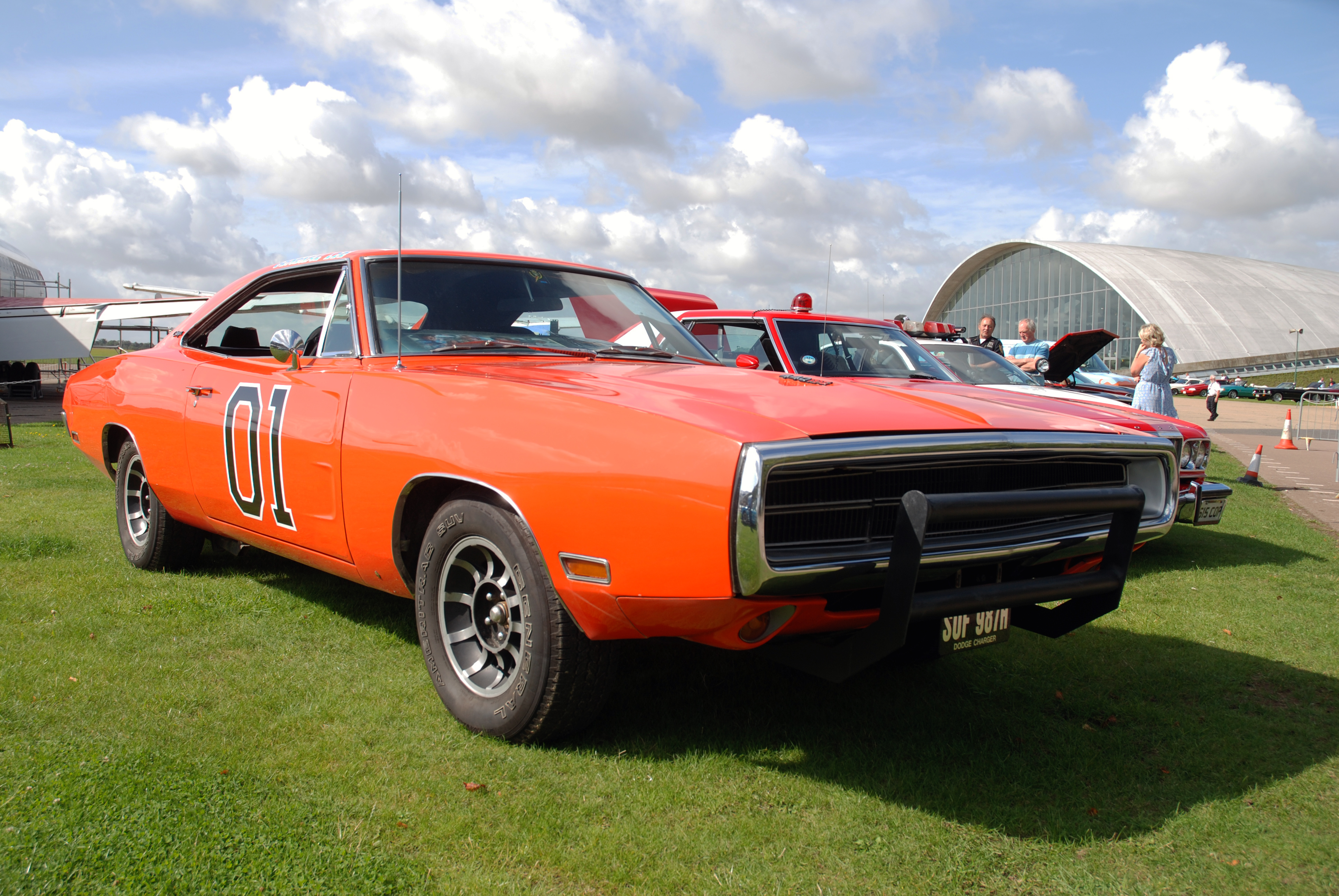 Duxford,Aug 2009